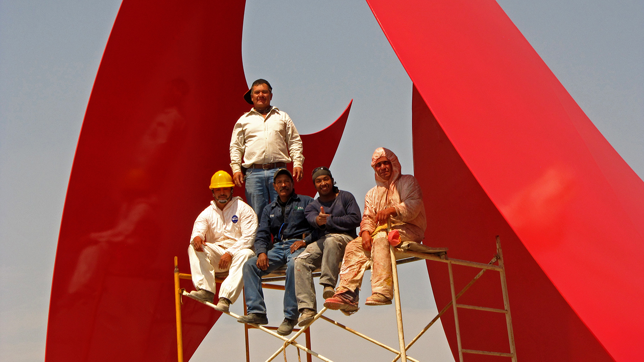 Escultura monumental de 12 metros de altura. Portal de la Serenidad.